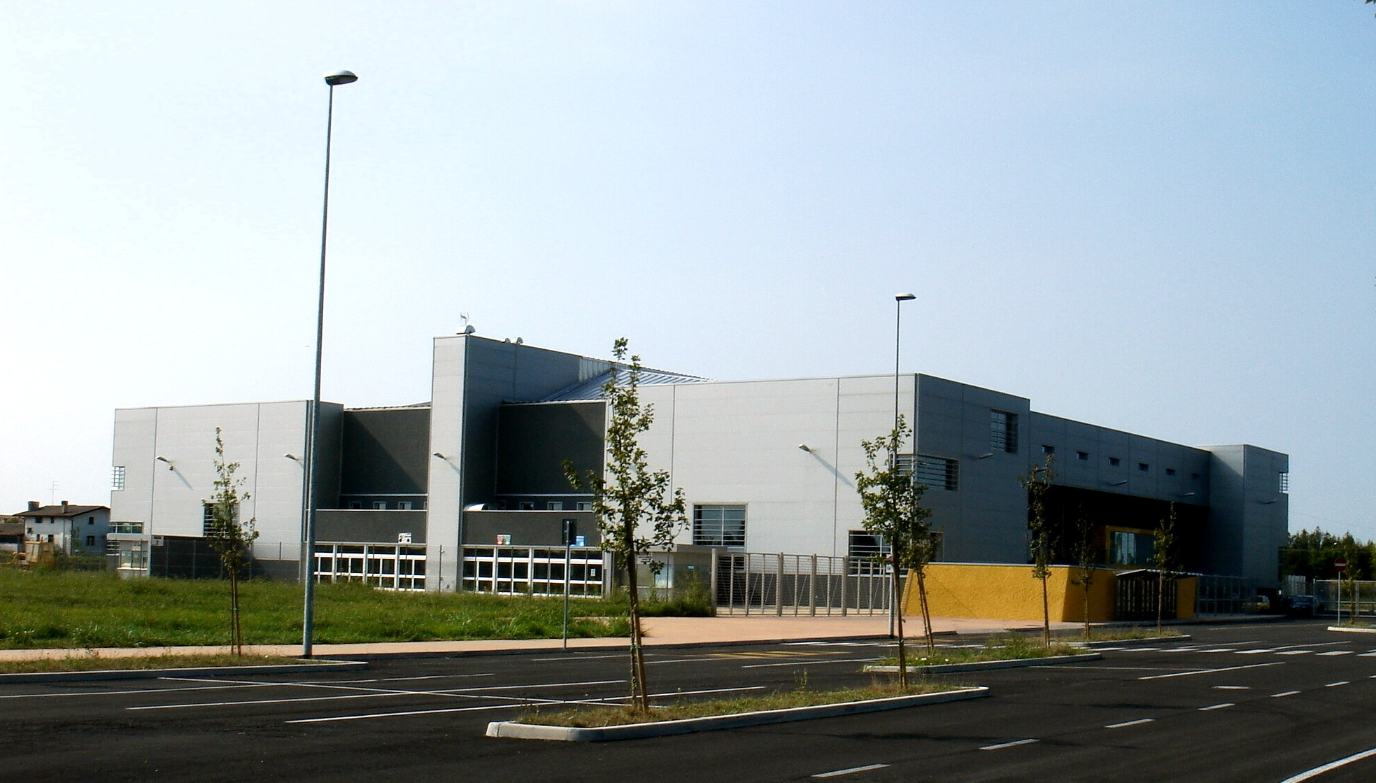 Campolongo di Conegliano (Treviso): Zoppas Arena (XXI secolo).